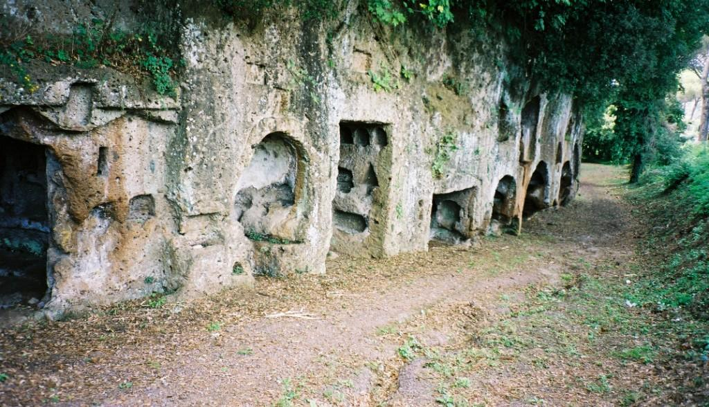 Necropoli di Sutri. Area archeologica.